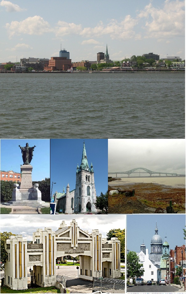 Trois-Rivières vue du Saint-Laurent montage